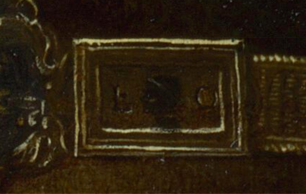 Détail sur la boucle de la ceinture portée par la femme